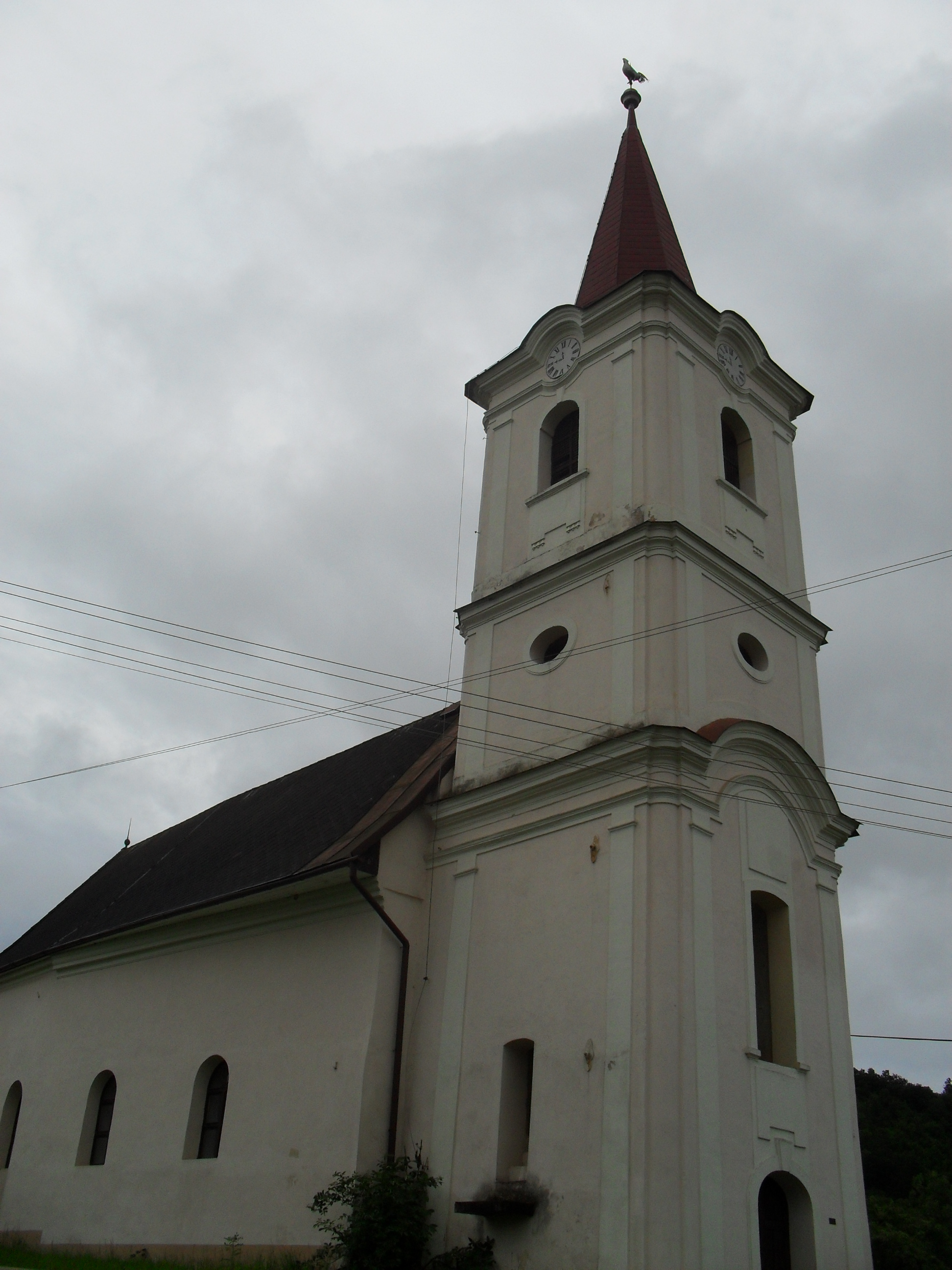 Gice - református templom